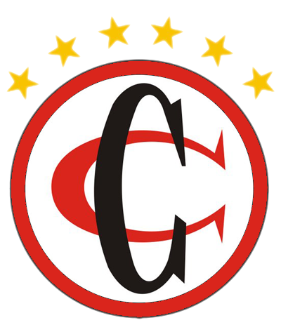 Logo: Campinense Clube, Campina Grande (Paraíba), Brazil.